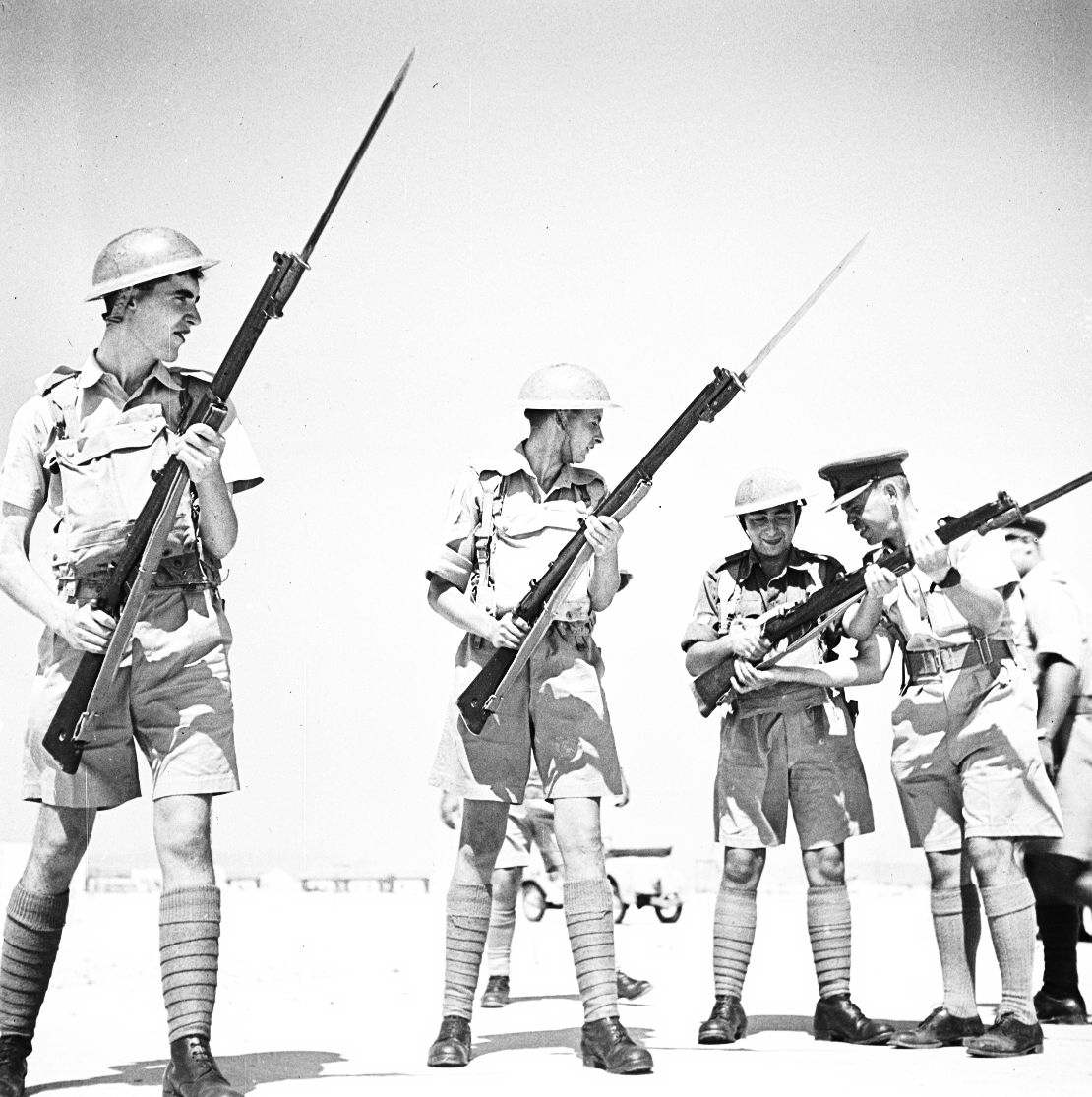 אוסף צילומים של הצלם זולטן קלוגר טווח מספרי התשלילים 18834 - 18952: Royal Engineers, Haifa חיל הנדסה, חיפה